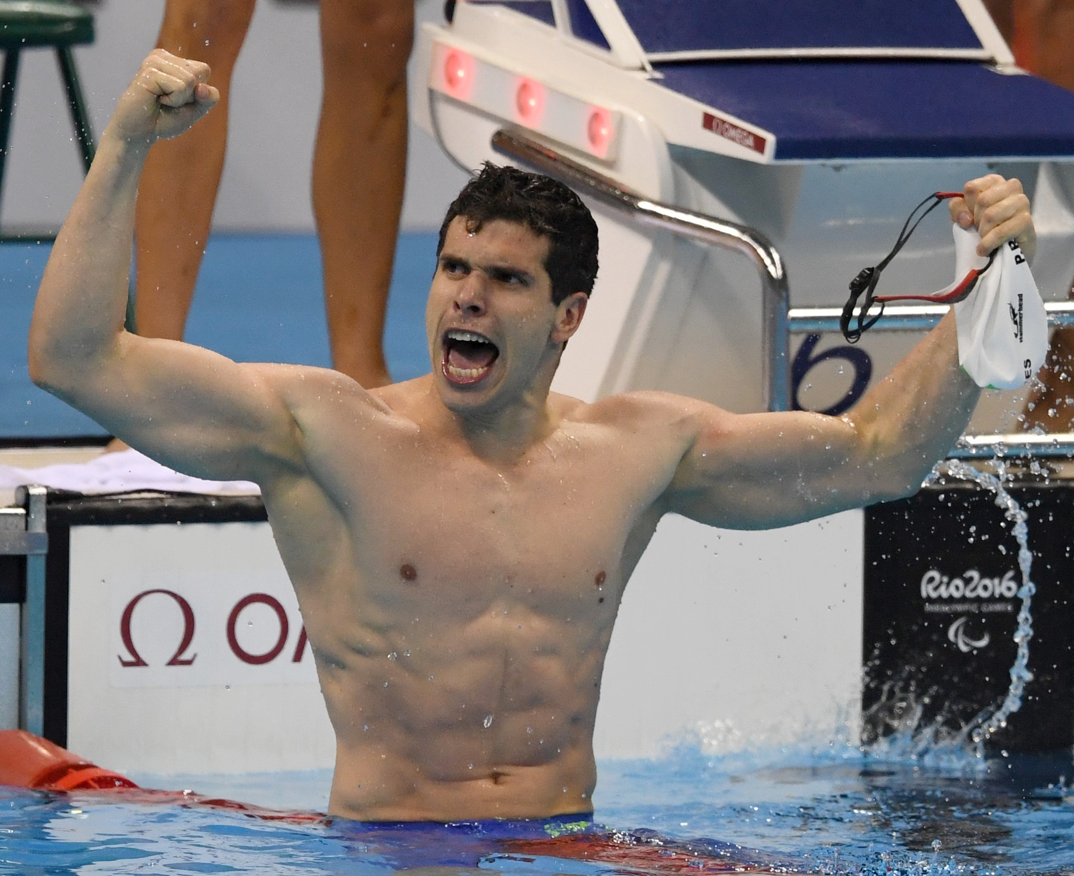 Rio de Janeiro - Brasil leva o bronze na prova de natação Revezamento 4x100m Medley Relay das Paralimpadas Rio 2016 (Tânia Rêgo/Agência Brasil)